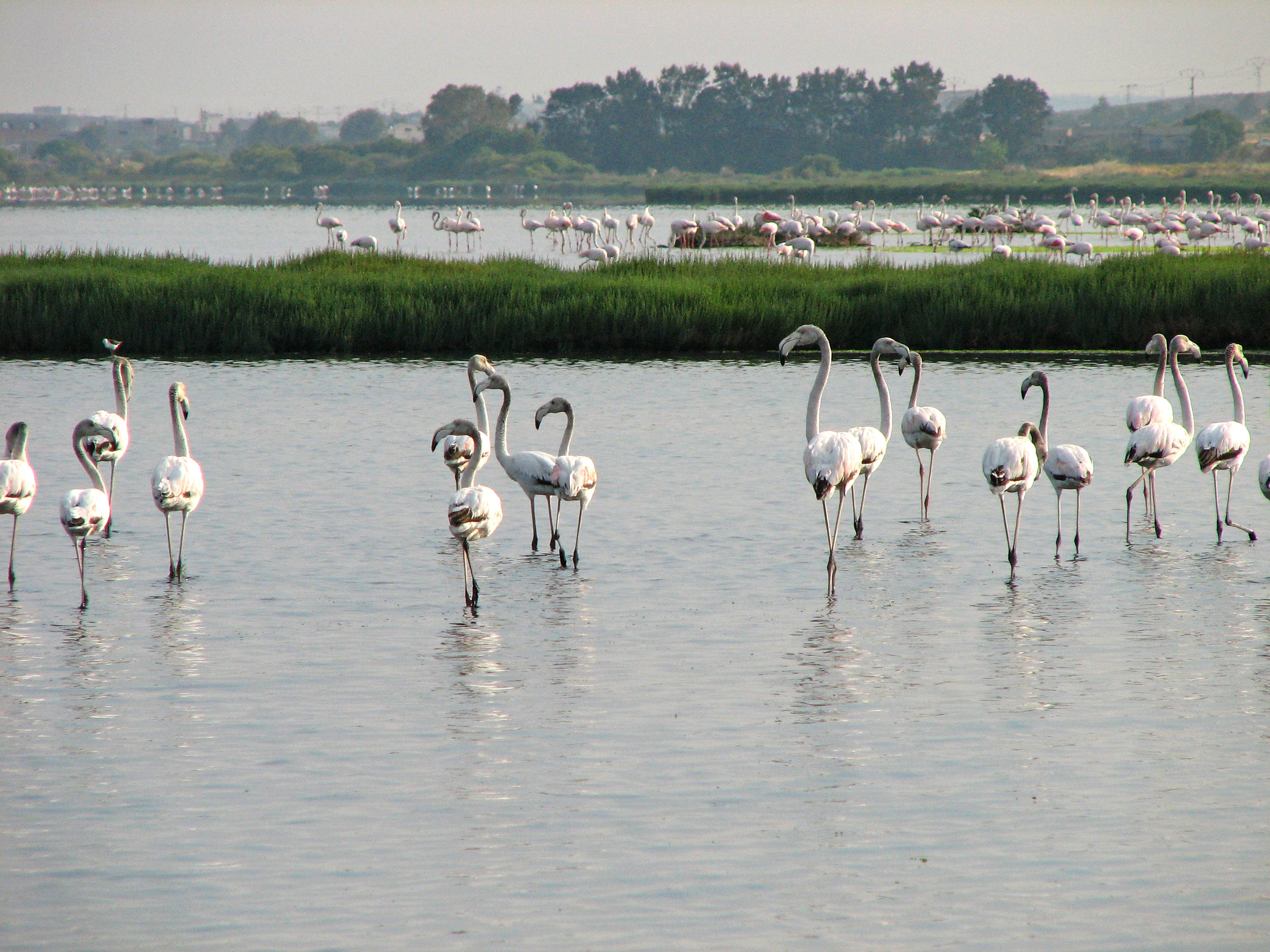 Lagune de Korba ou Sebkha de Korba, Cap Bon, Tunisie, avec Phoenicopterus roseus